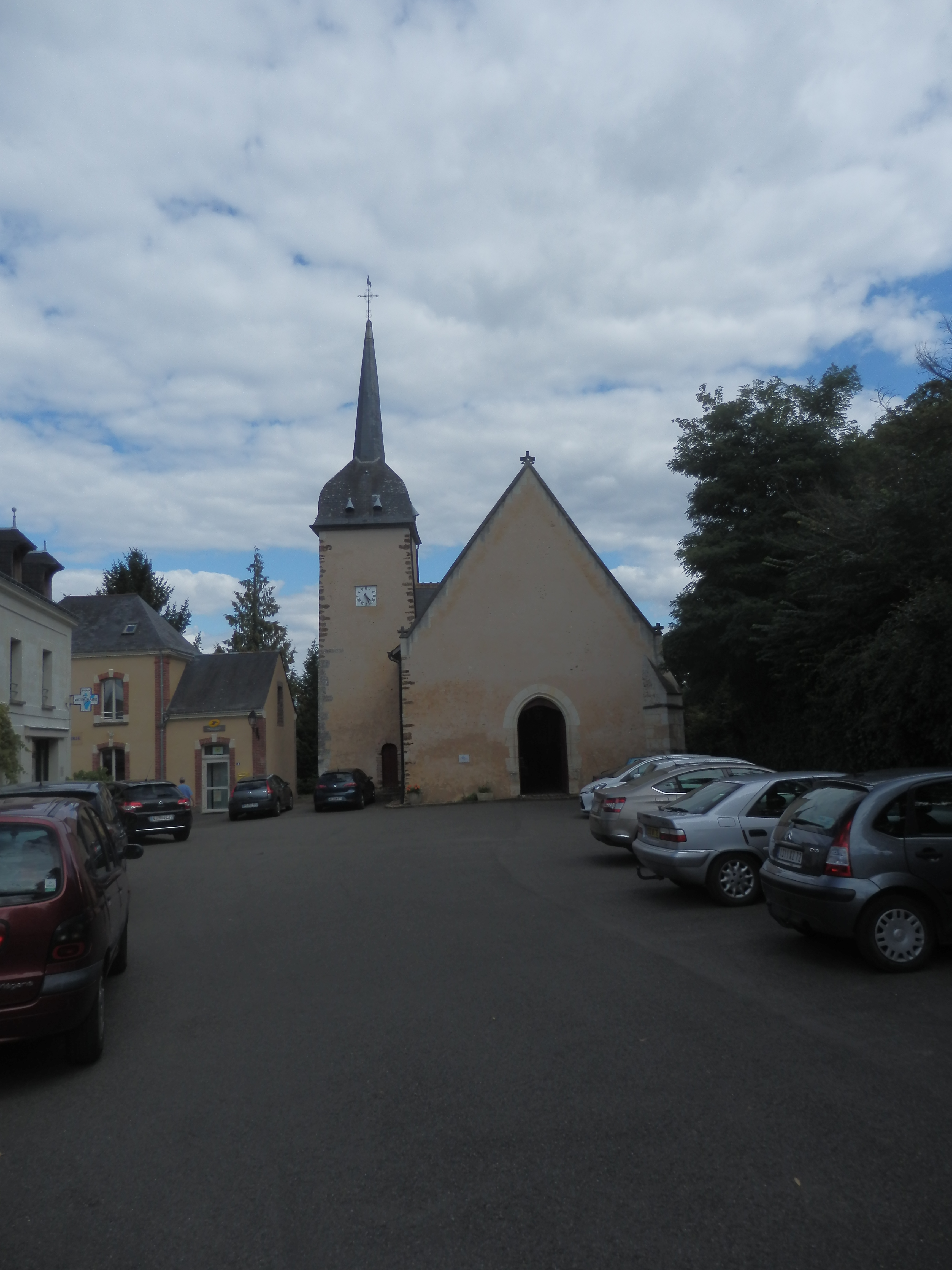 Place de l'église.